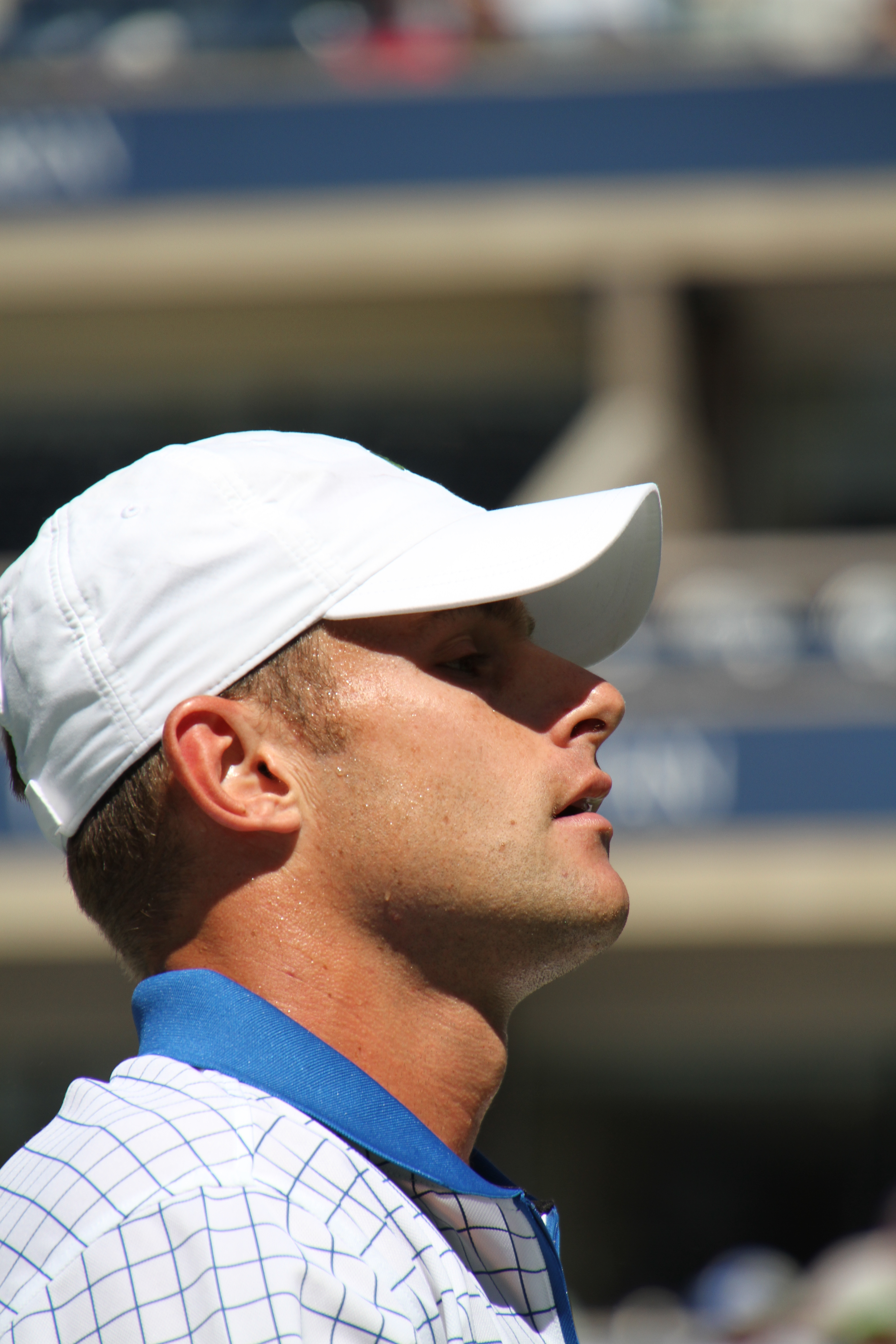 Andy Roddick